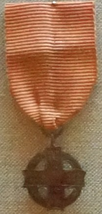 médailles présentées dans la salle au rez-de-chaussé.